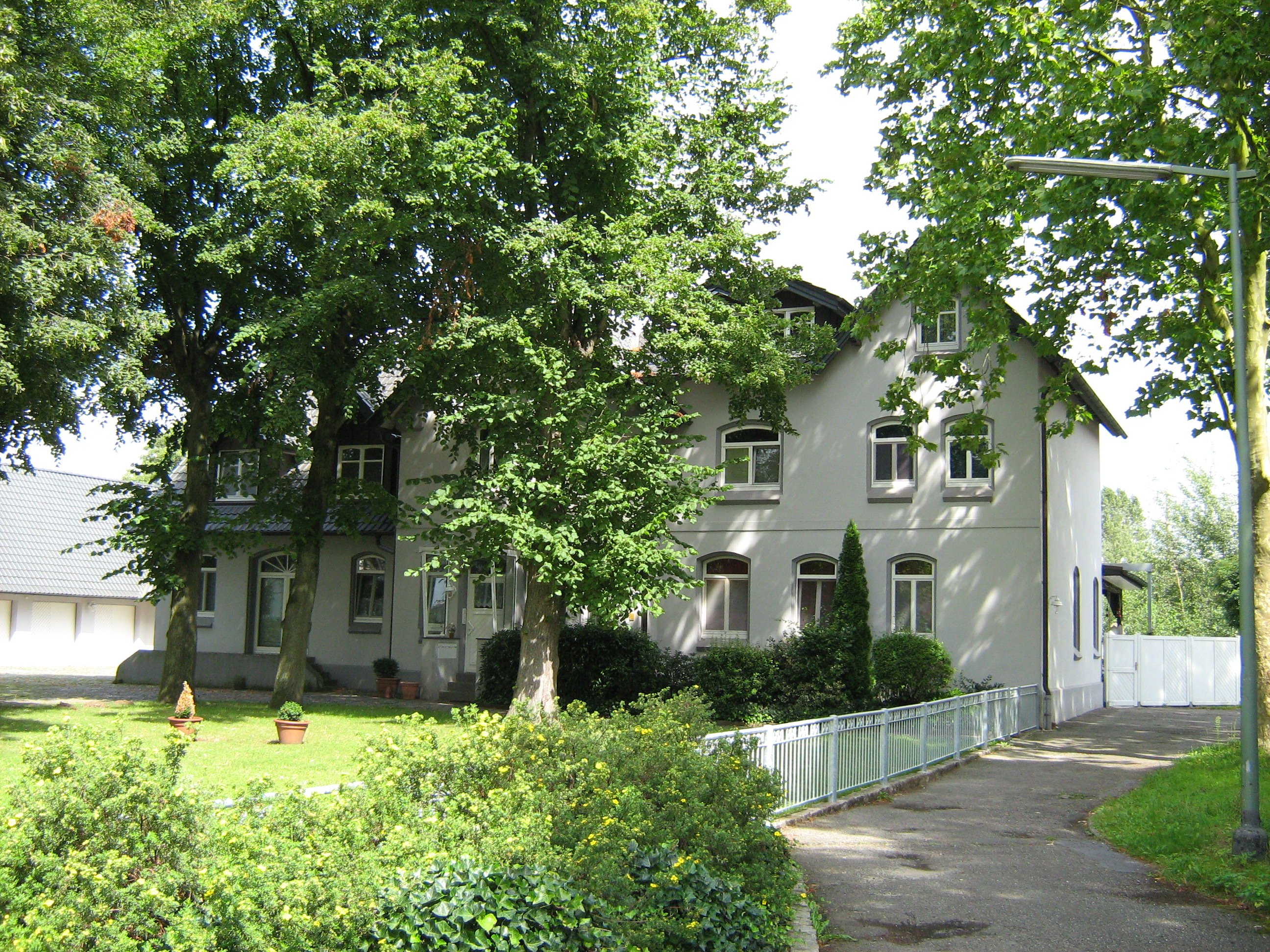 ehemaliges Bahnhofgebäude Halen (Lotte) 2008